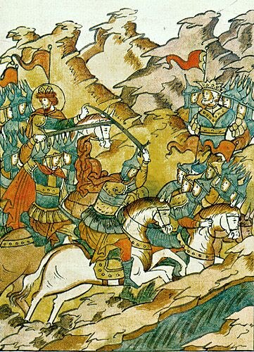 Якаў Палачанін з мячом падчас Неўскай бітвы